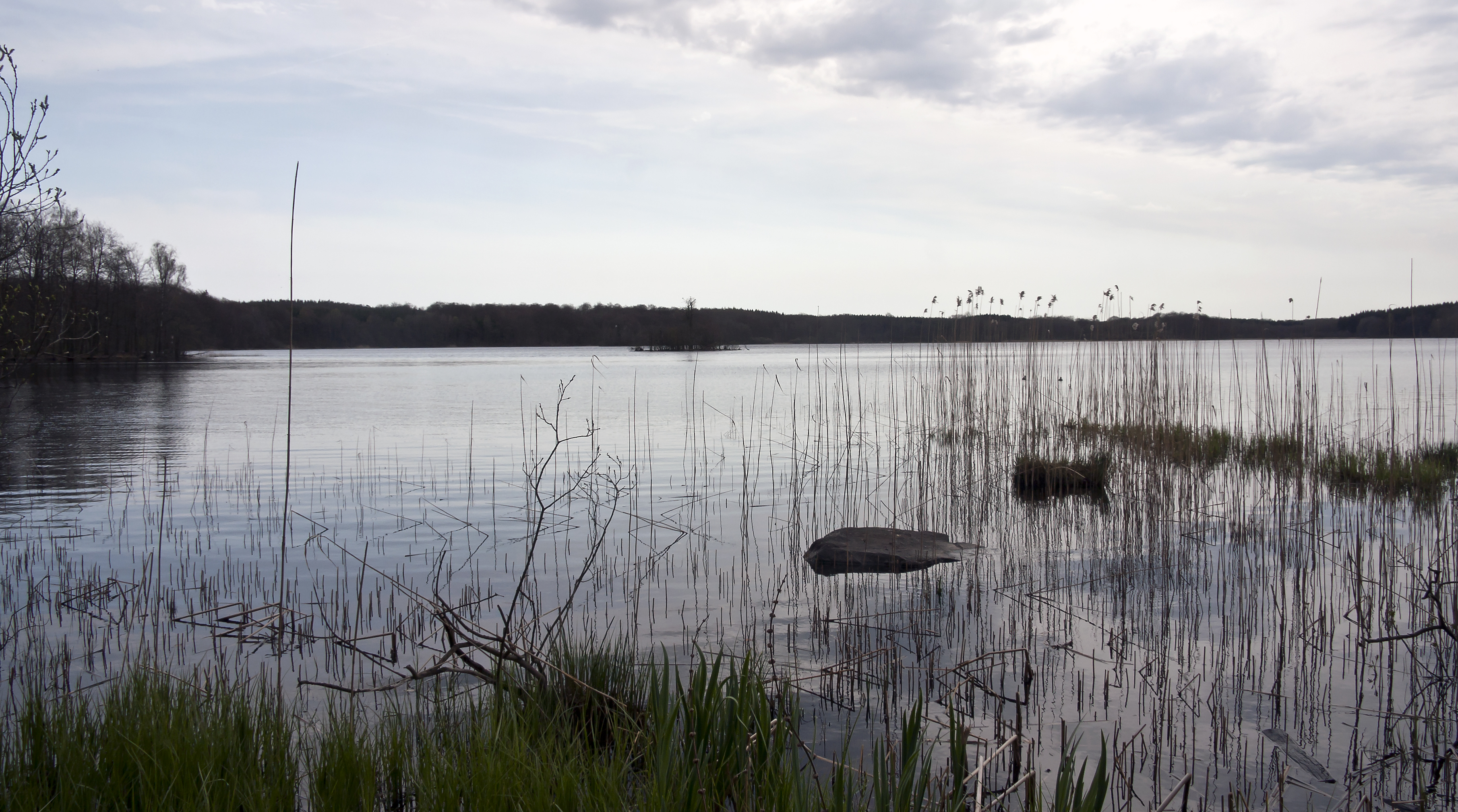 Bosarpasjön från norra änden.